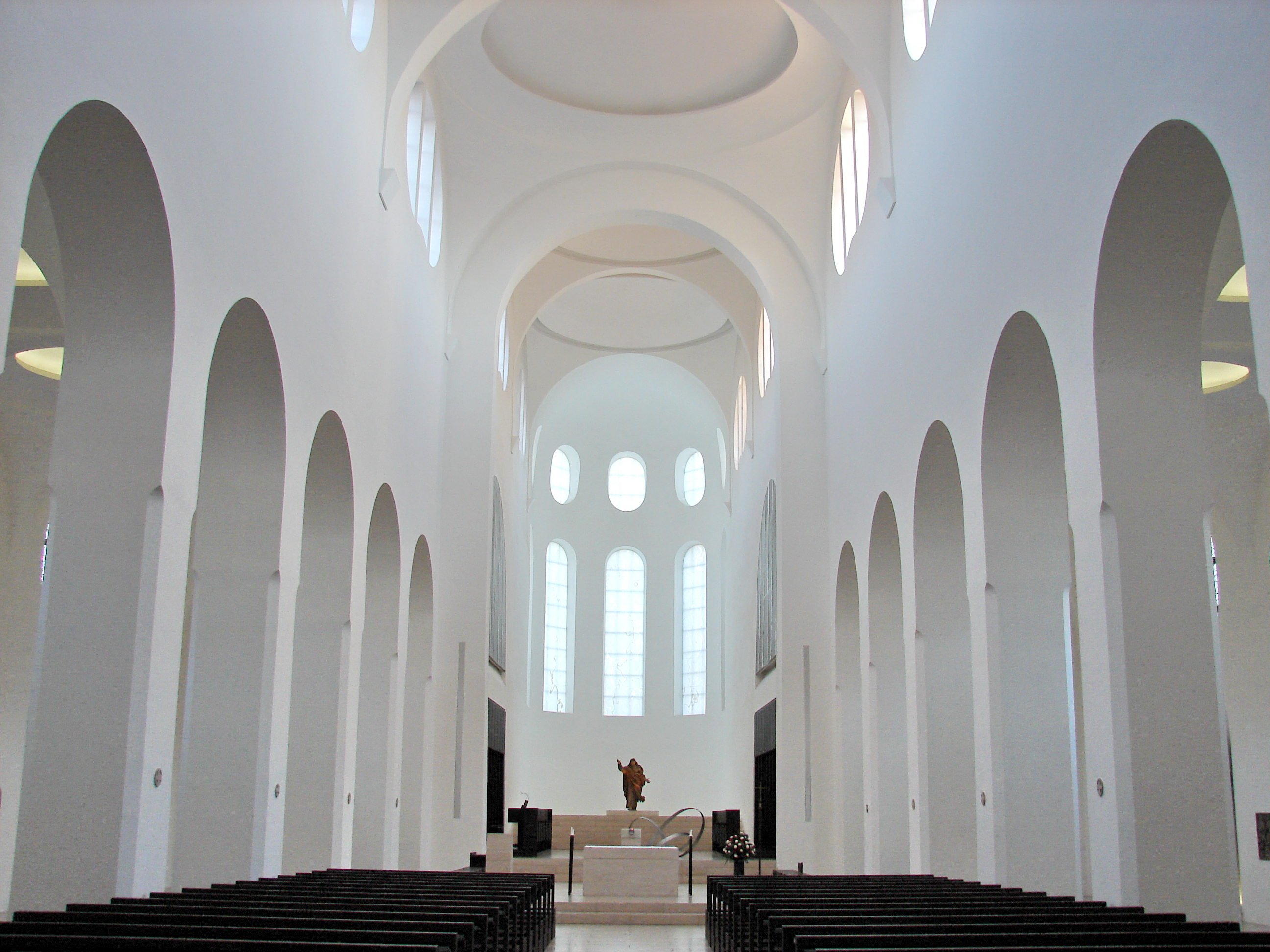 St. Moritz in Augsburg gilt als einer der ältesten Kirchbauten in der bayerischen Großstadt.